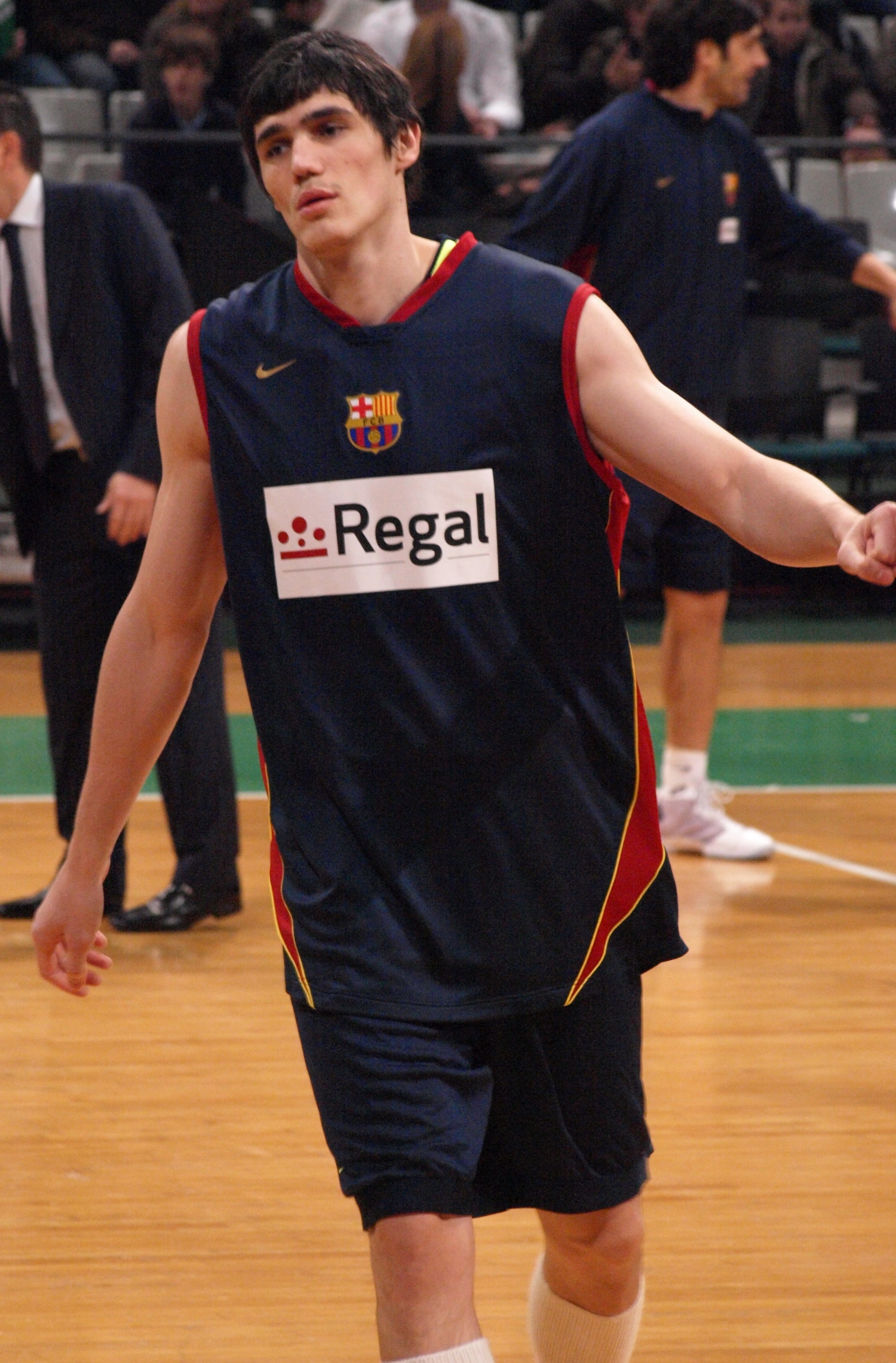 Ersan Ilyasova, en el partido que enfrentó al FC Barcelona y al DKV Joventut de liga ACB en el Olímpico de Badalona en enero de 2009